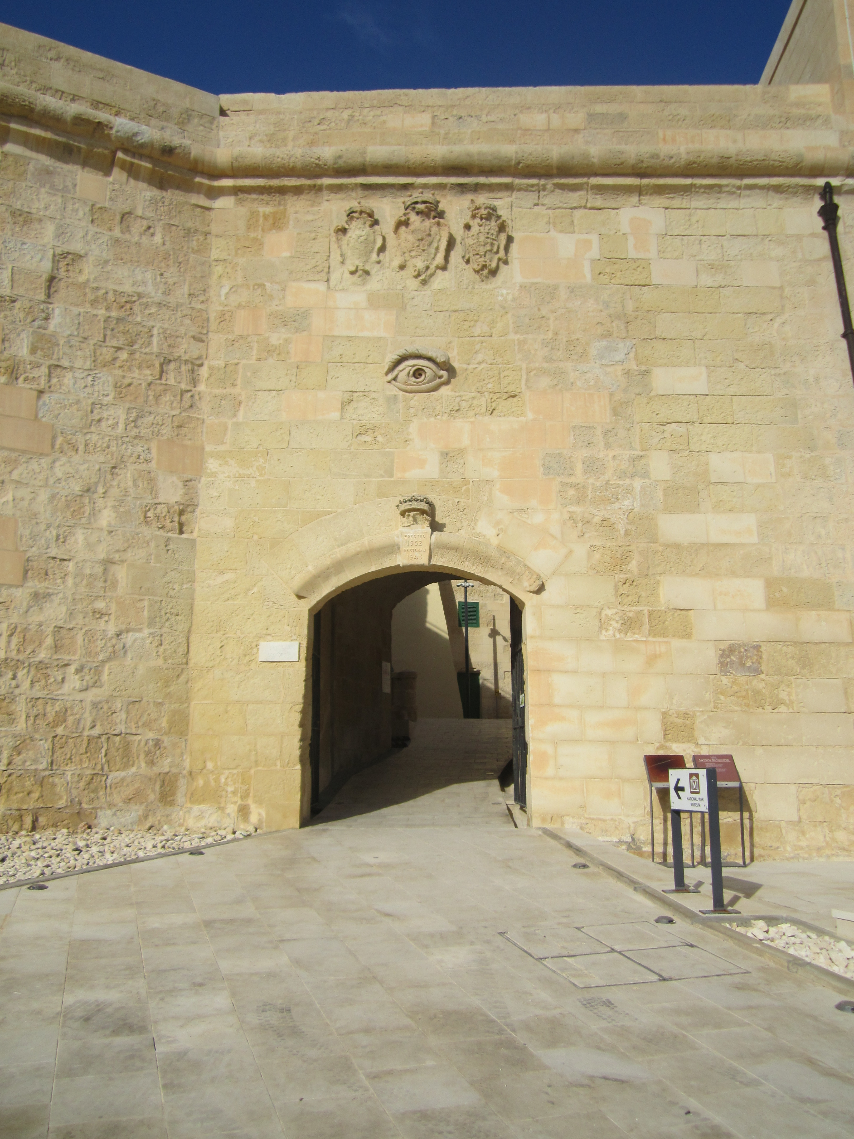 Puerta por donde, durante el Gran Asedio de 1565, se le suministraba al Fuerte hombres, víveres, etc.